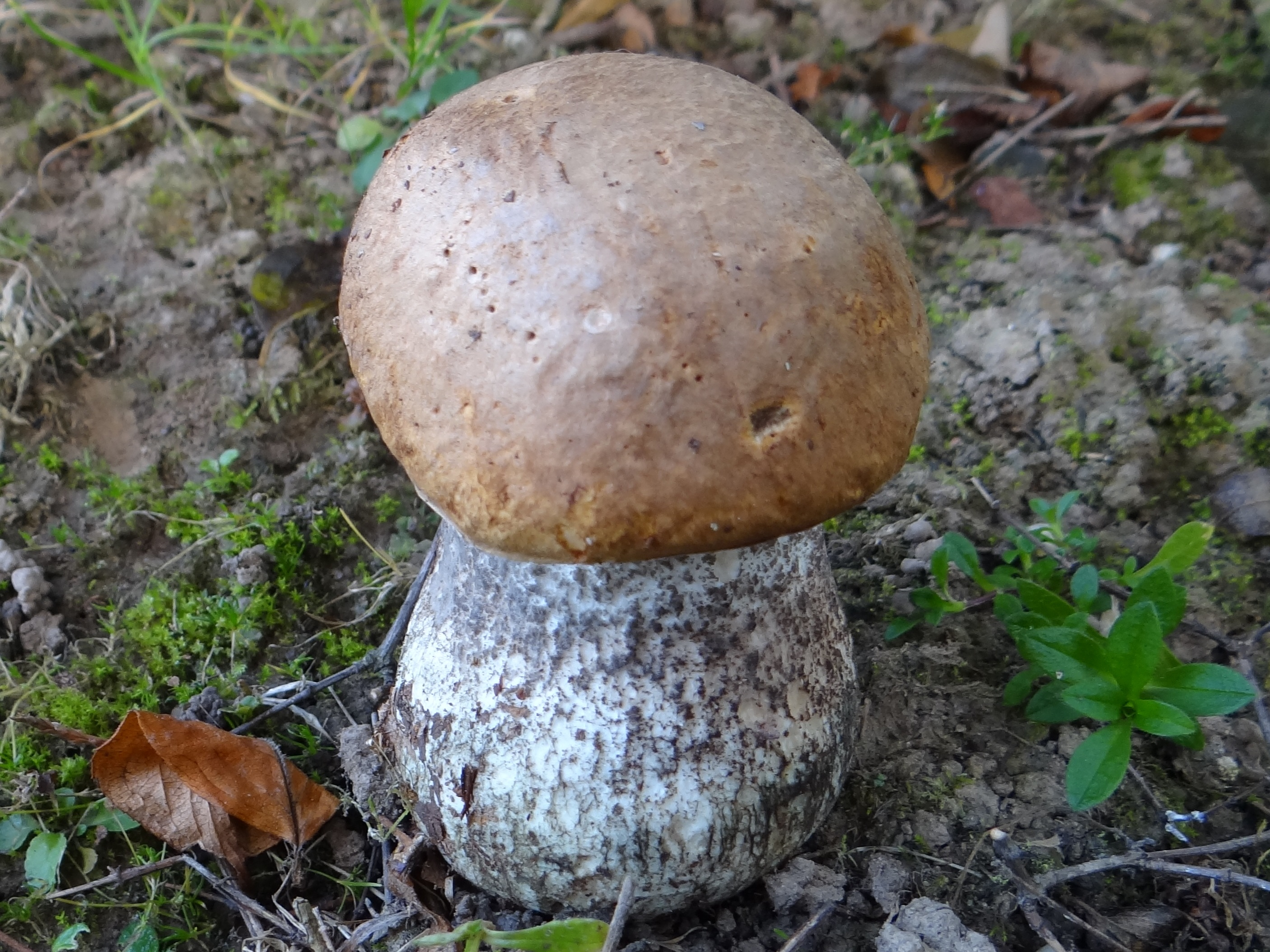 Leccinum versipelle